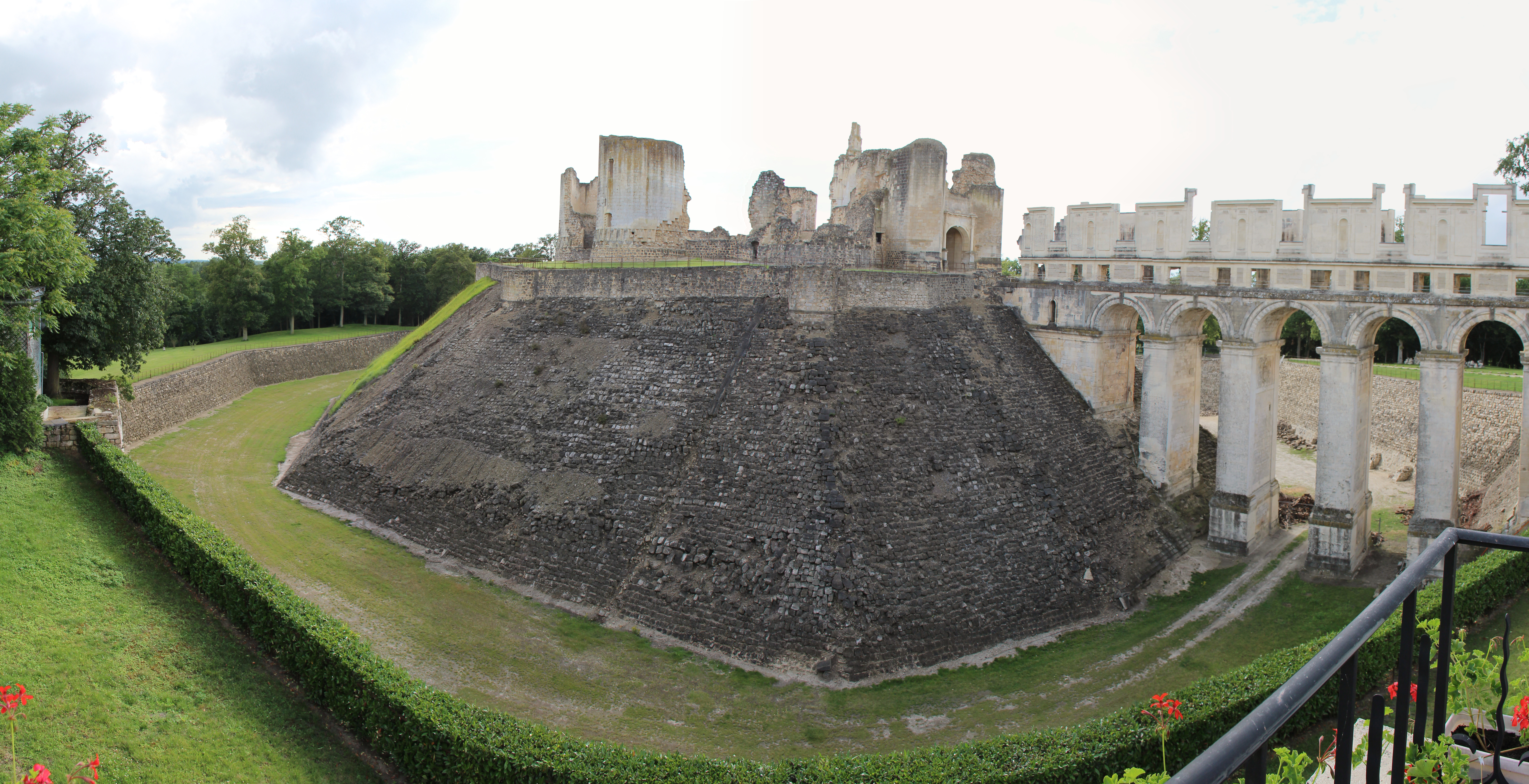 Château de Fère-en-Tardenois (Aisne, France) This building is en partie classé, en partie inscrit au titre des Monuments Historiques. .